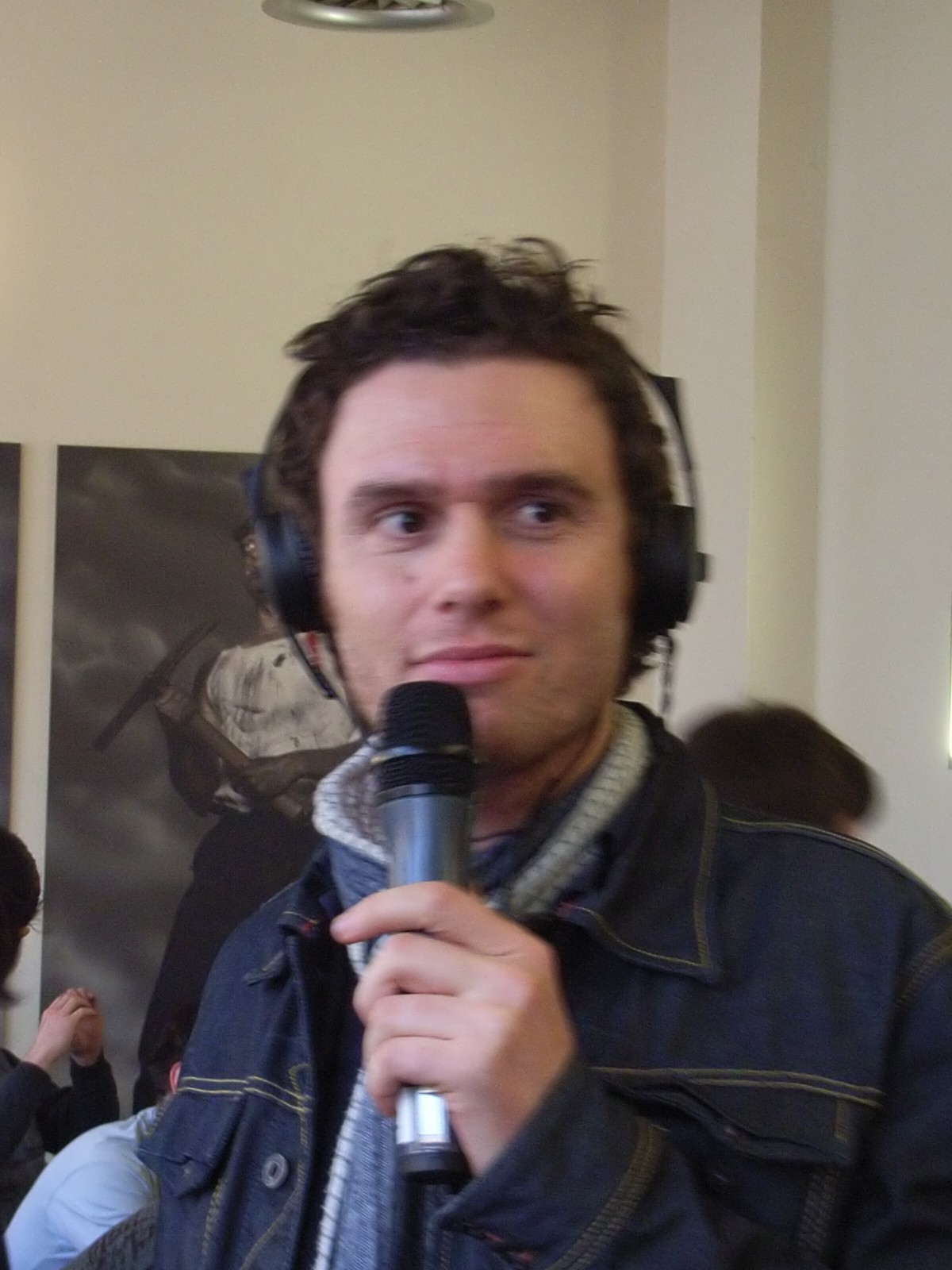 Rundfunkmoderator Michael Imhof während einer Sendung des Senders 1LIVE aus dem Miner's Coffee in Bielefeld am 11. April 2008.